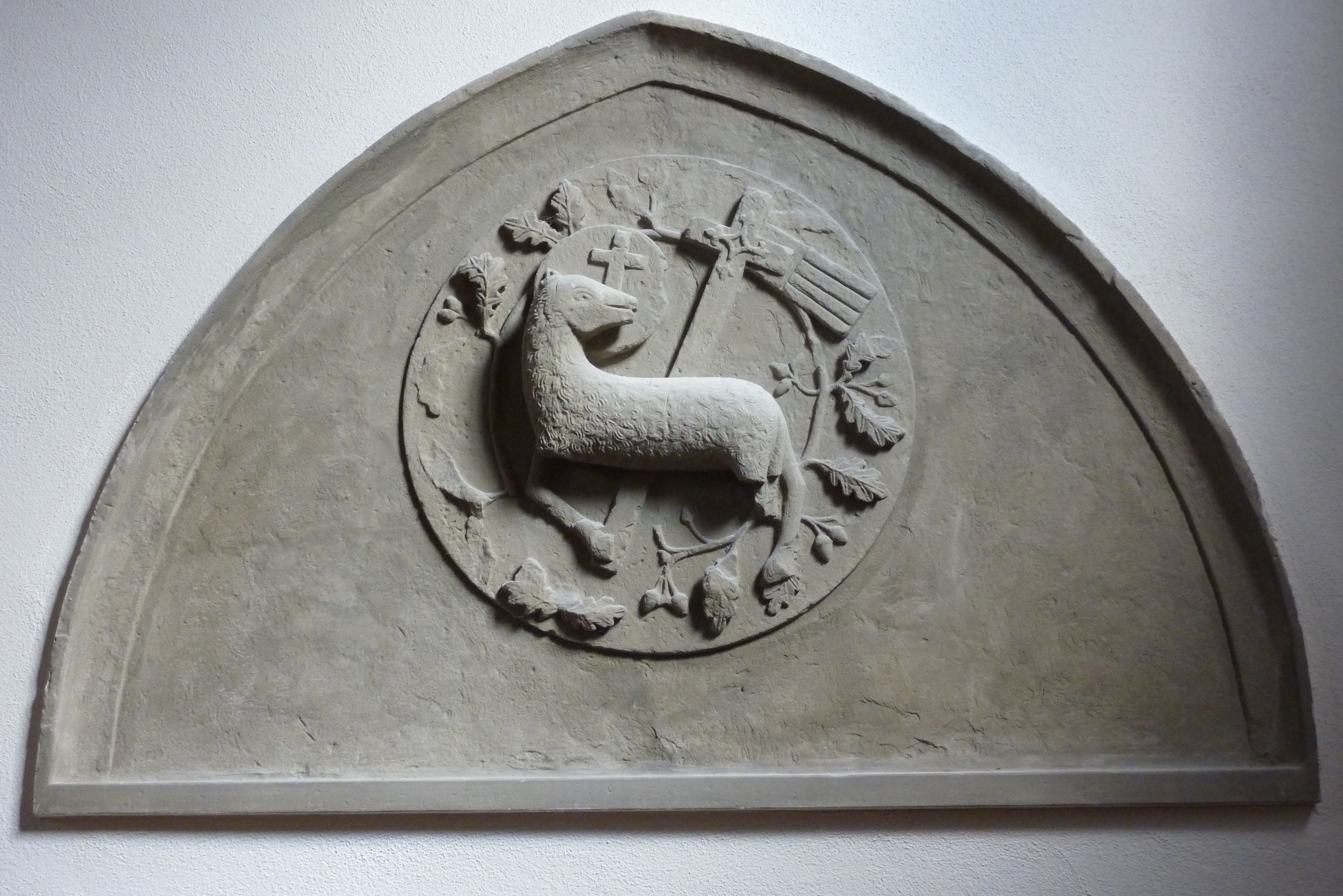 Evangelische Kirche in Mühlbach (Eppingen), Lamm mit Kreuzfahne aus dem ehemaligen Portaltympanon